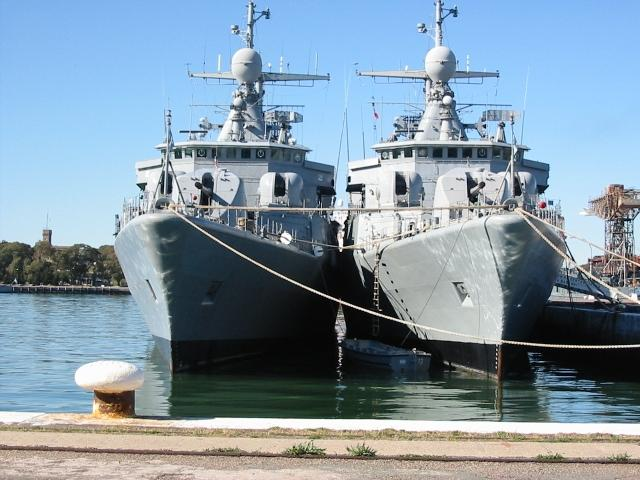 Destructor D-12 ARA Heroína y D-13 ARA Sarandí.